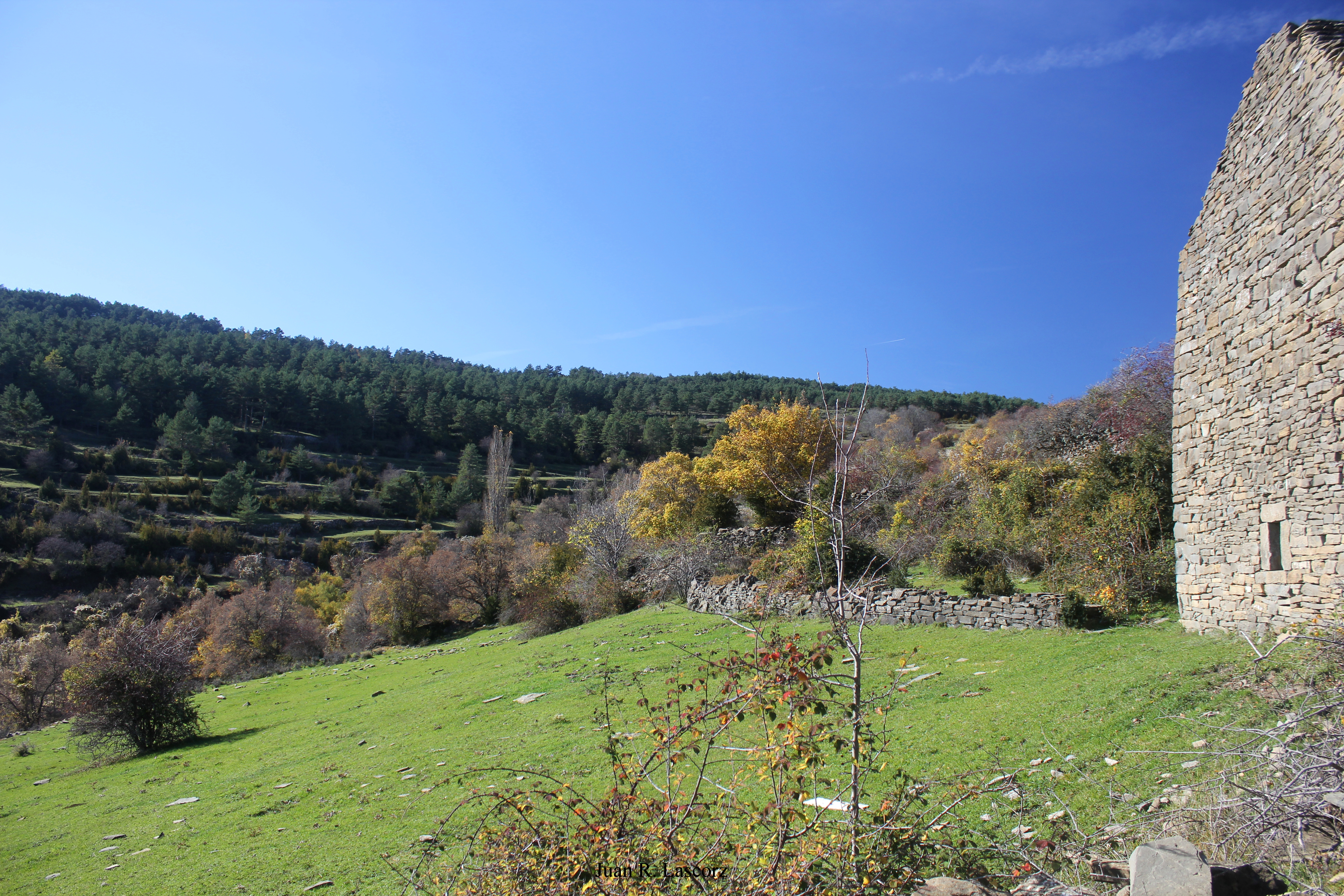 Aragonés: Estribacions d'o cerro u sarrato de Sant Blas, alto de Basarán. O dito cerro remata en o cuello Basarán.